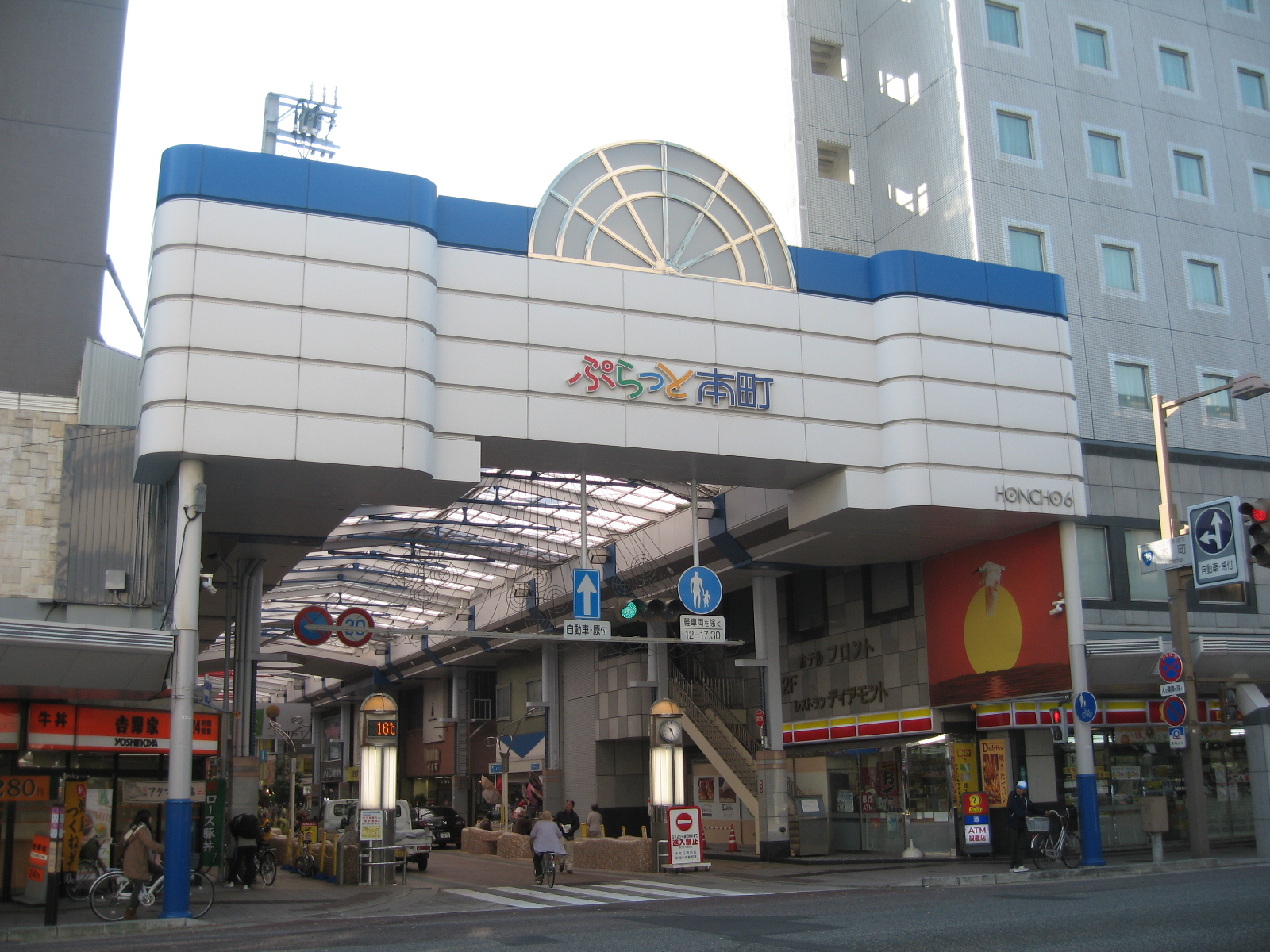 新潟県新潟市中央区。本町通6番町の画像。